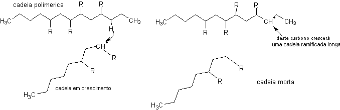 polimerização radicalar